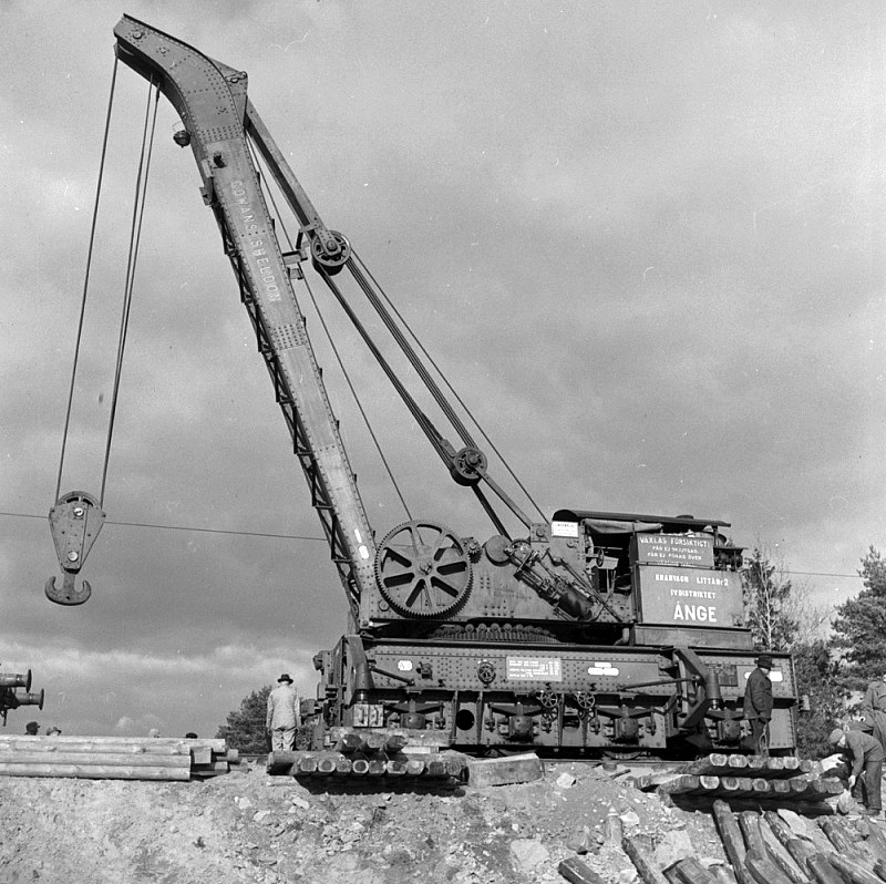 "Urspåring i Ulriksdal (Ursvik), mars 1950. Bärgning av ellok med SJ:s två bärgningskranar."